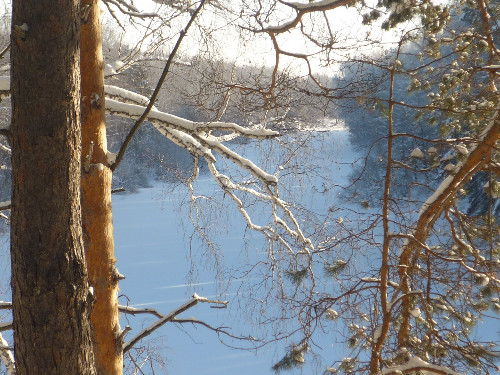 Замерзшая старица реки Тара